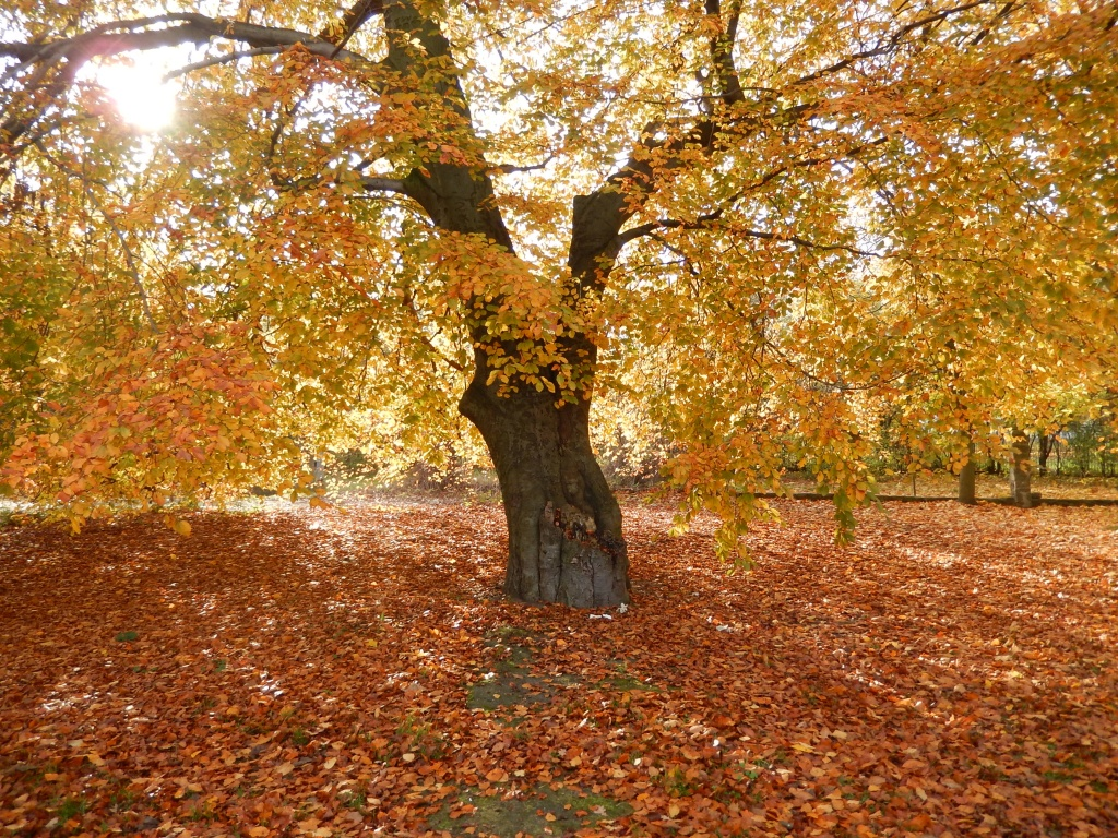 600. Buk odm. czerwonolistnej - pomnik przyrody - park Steffensa w Gdańsku.